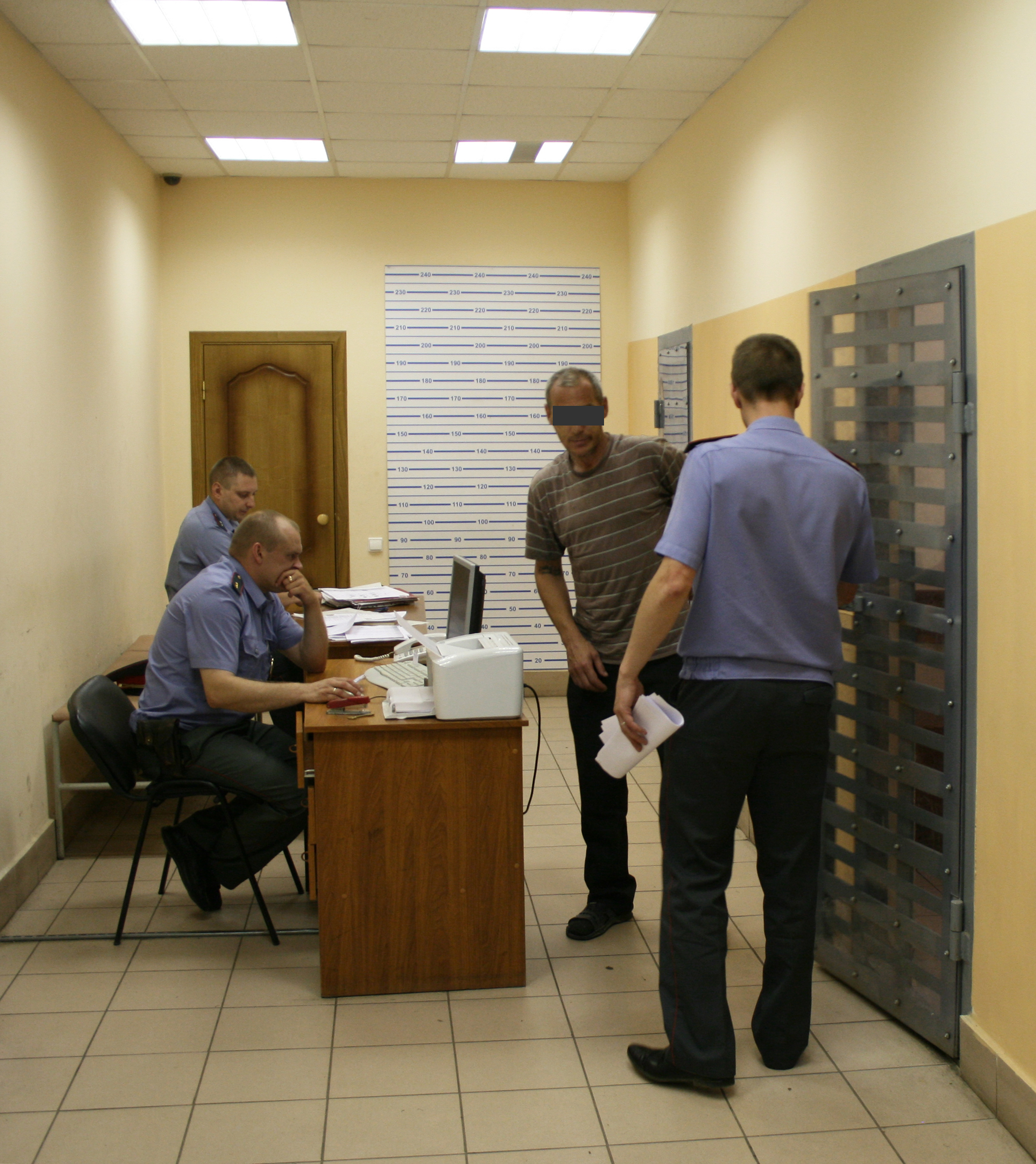 Работа дежурной части территориального органа МВД России